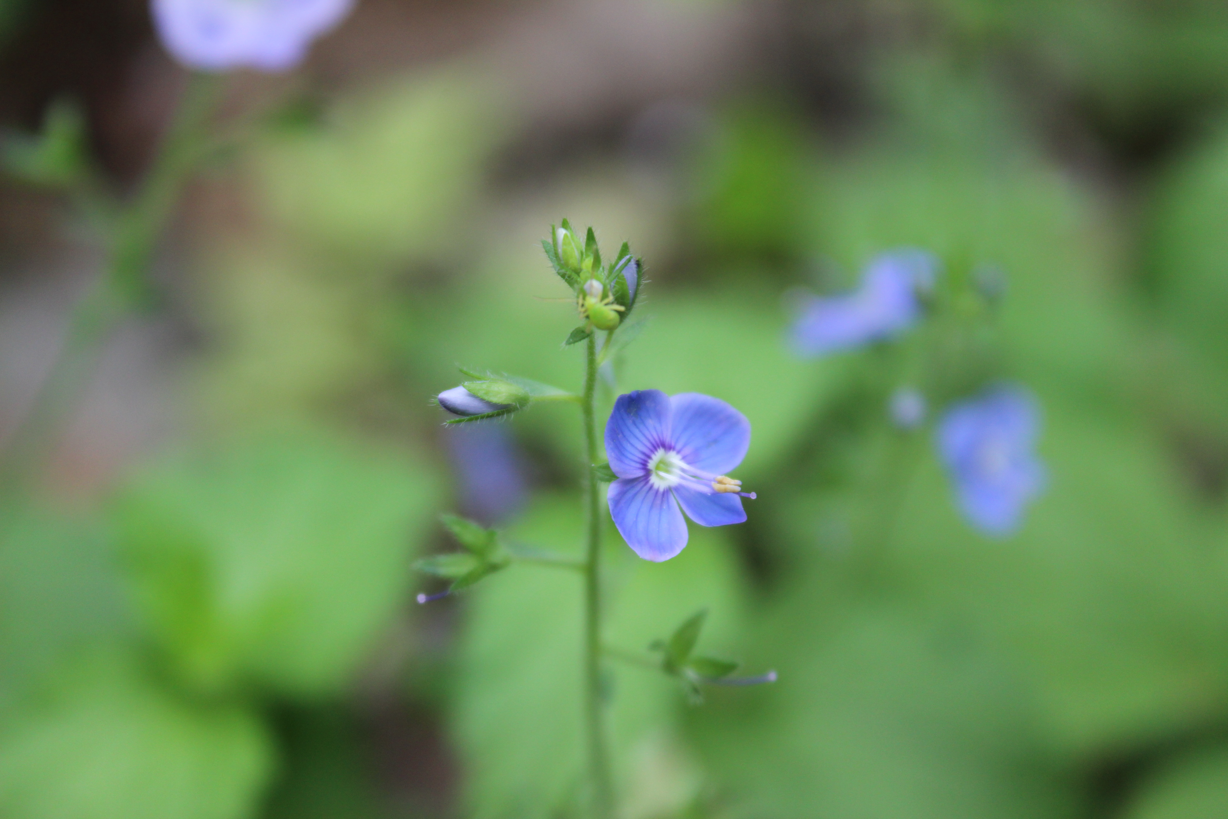 Косинский заповедник, This image is related to the protected area of Russia number 5000004